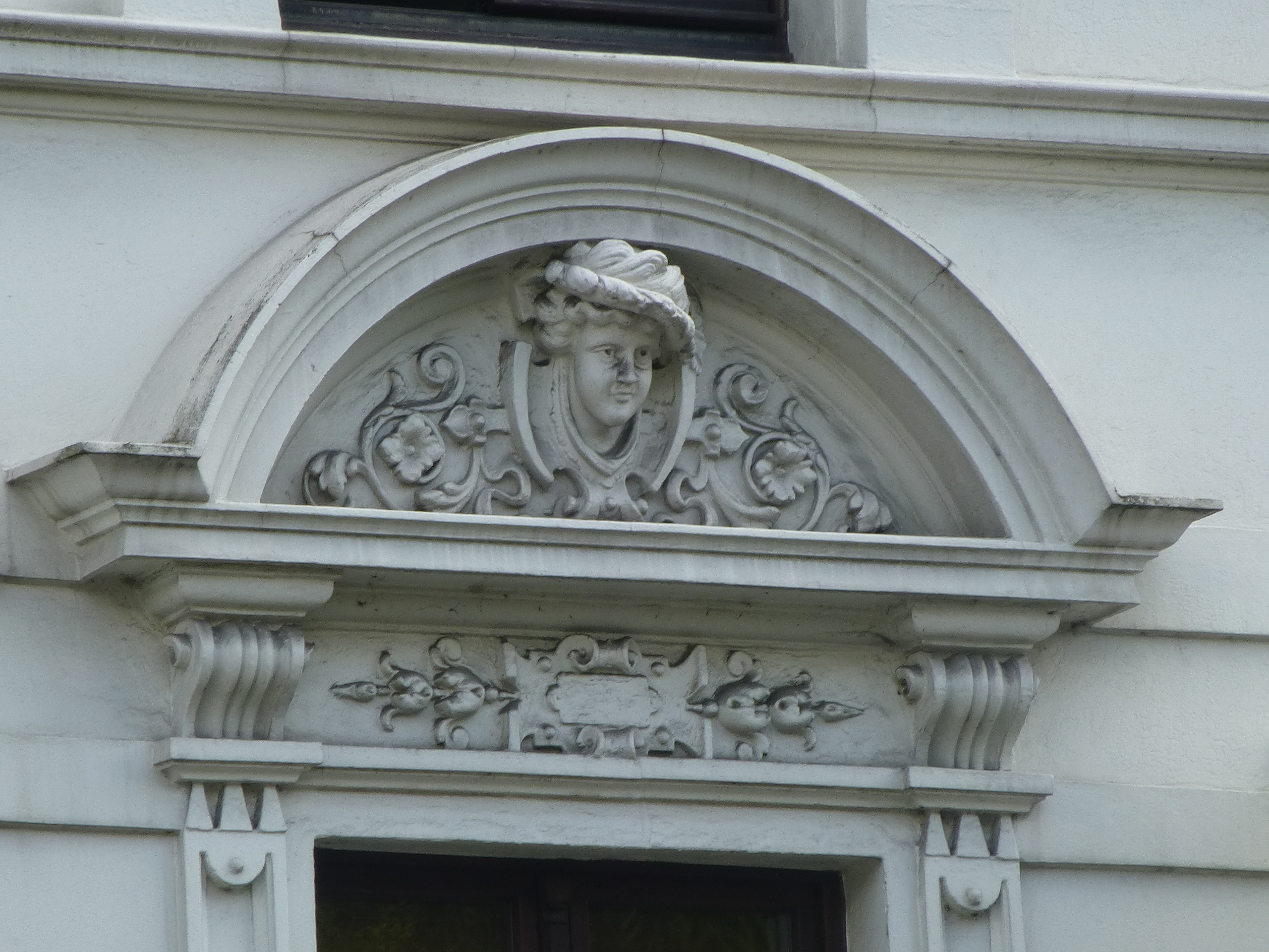 Lunette an der Fassade Remscheider Straße 43, Wuppertal-Ronsdorf